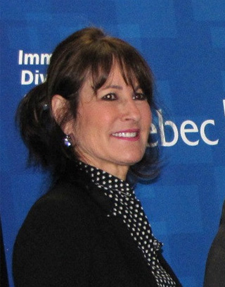 Kathleen Weil en 2015.